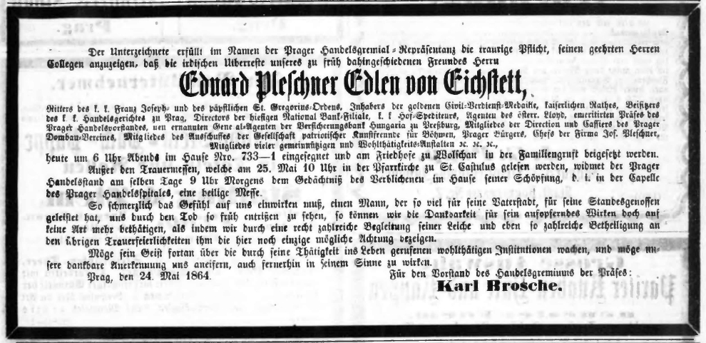 Todesanzeige für Eduard Pleschner von Eichstett (1813-1864)